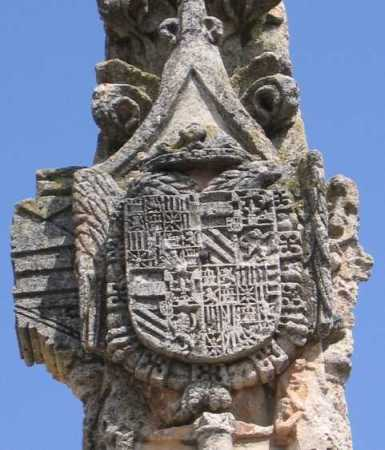 Detalle del escudo de los Austrias en el rollo de Presencio. Foto tomada por Sanbec